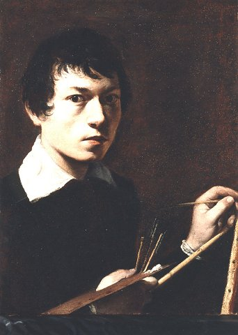 Self-portrait.